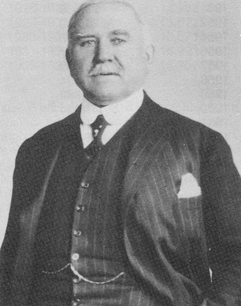 Hubert Biermans